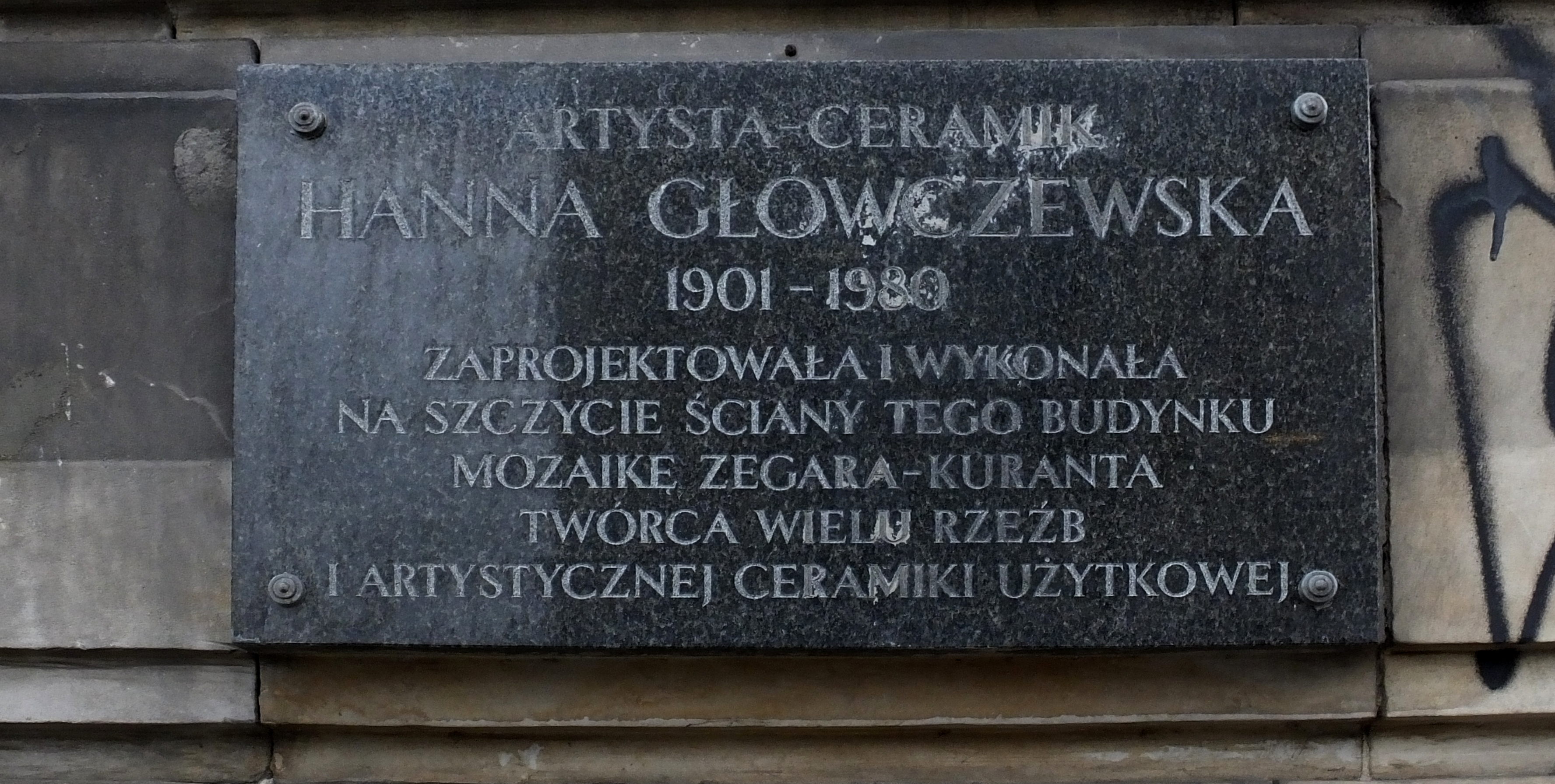 MDM, blok przy Wilczej 35/41. Pamiątkowa tablica informacyjna: Artysta-ceramik Hanna Główczewska 1901-1980 zaprojektowała i wykonała na szczycie ściany tego budynku mozaikę zegara-kuranta. Twórca wielu rzeźb i artystycznej ceramiki użytkowej.